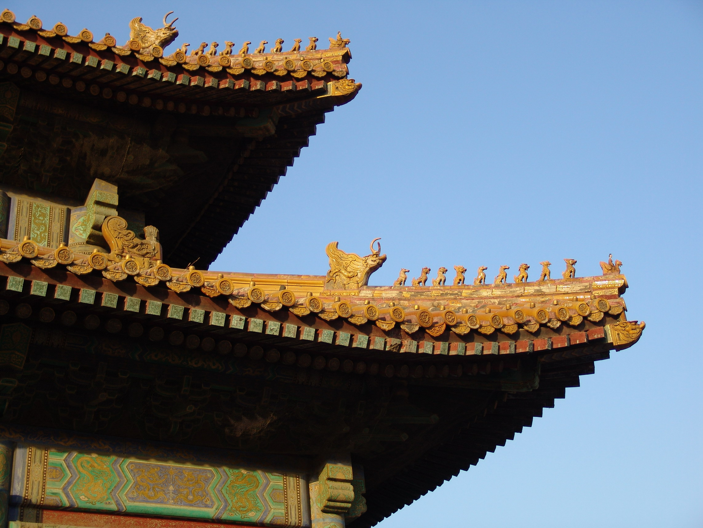 Forbidden City